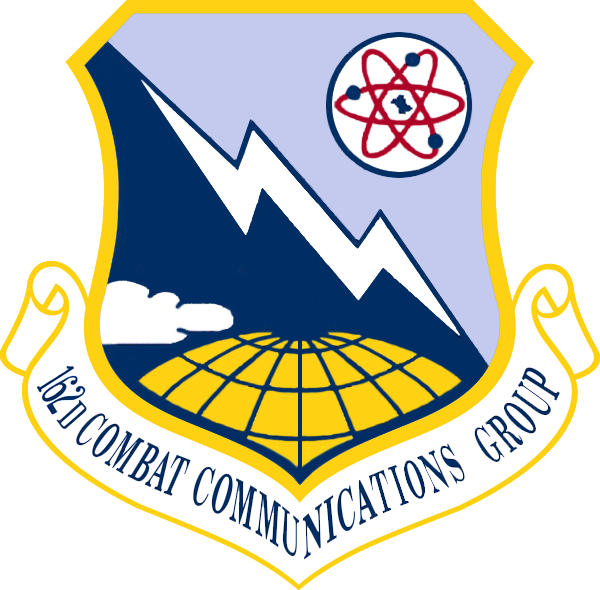 162d Combat Communications Group